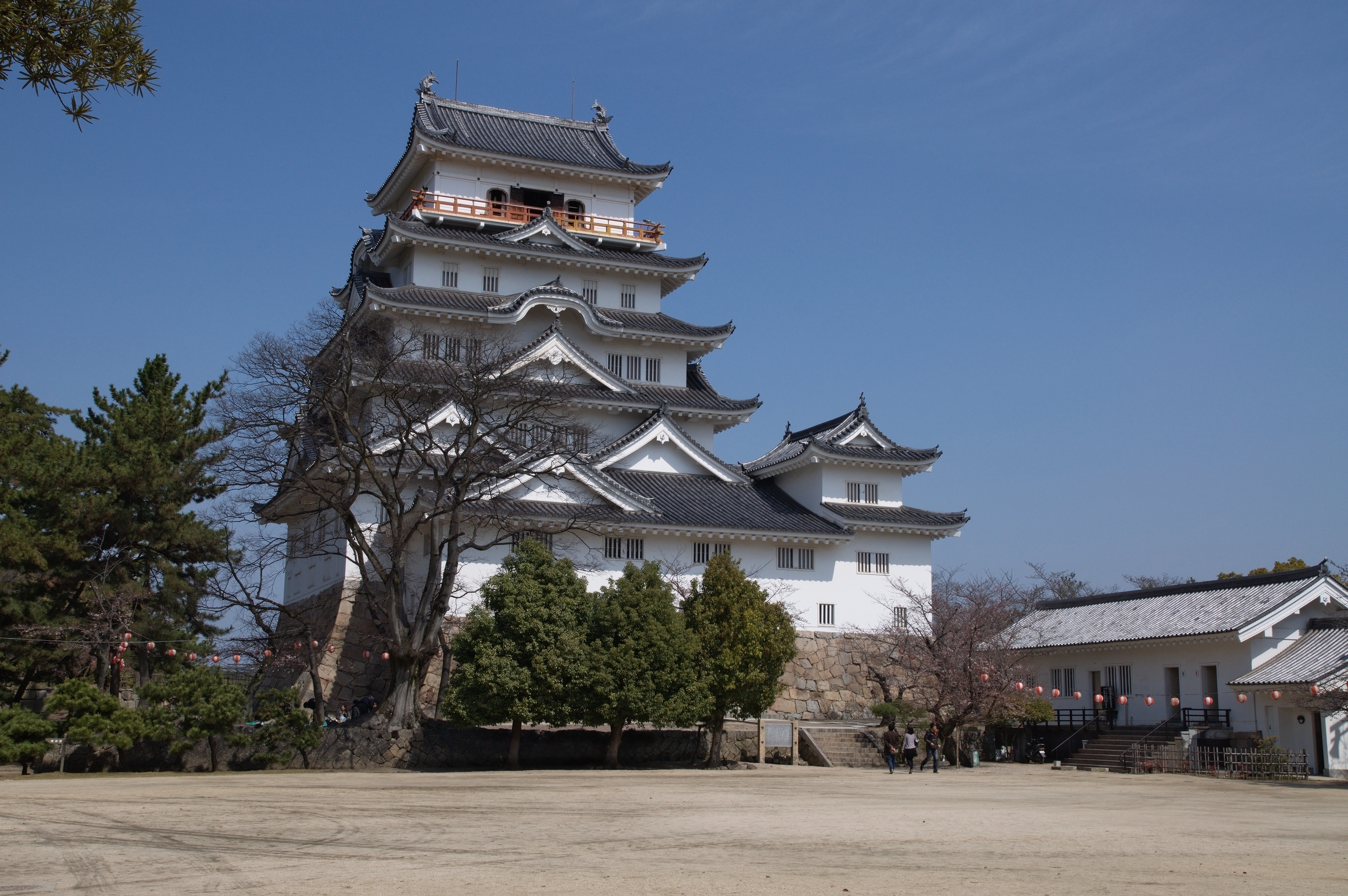 福山城天主